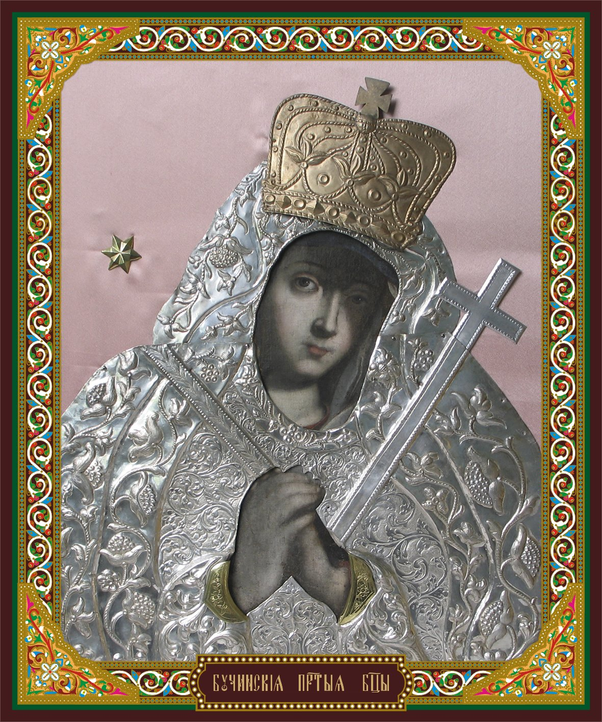 Бучинська Ікона Божої Матері 2008 рік